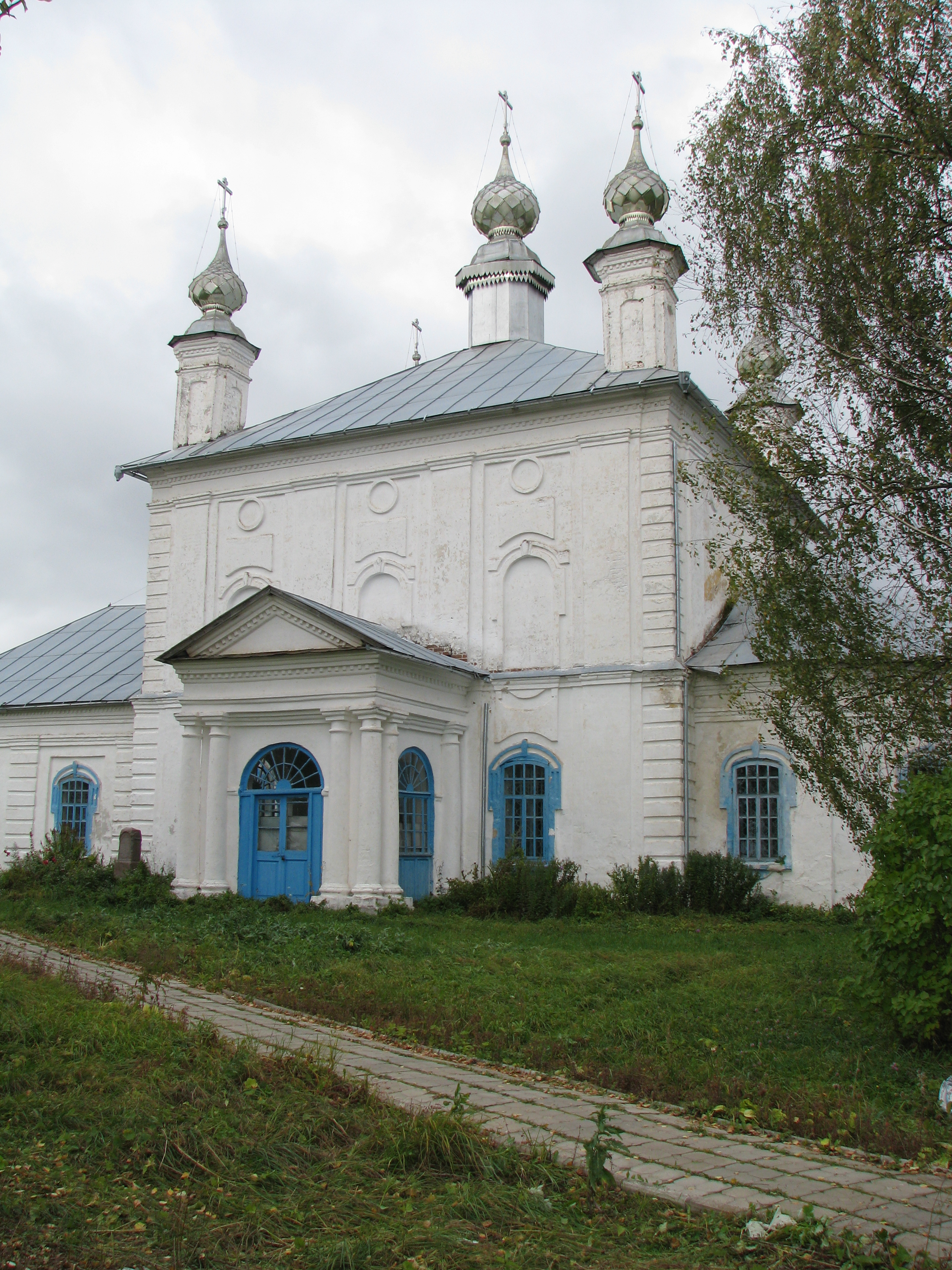 Введенская церковь (Рождества Христова): улица Заречная, 2, Филисово, Родниковский район, Ивановская область